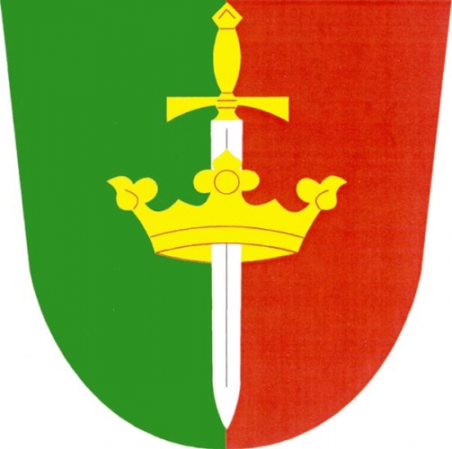 znak, Vranovská Ves, okres Znojmo